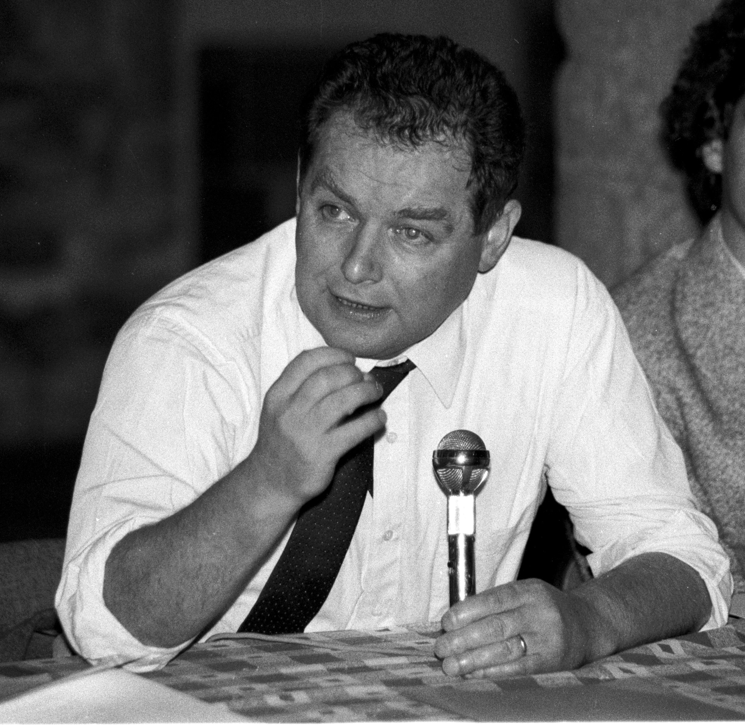 Alexis Gourvennec à Saint-Pol-de-Léon (Finistère, France).